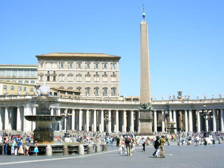 Zelfgemaakte foto door: Mark de Man